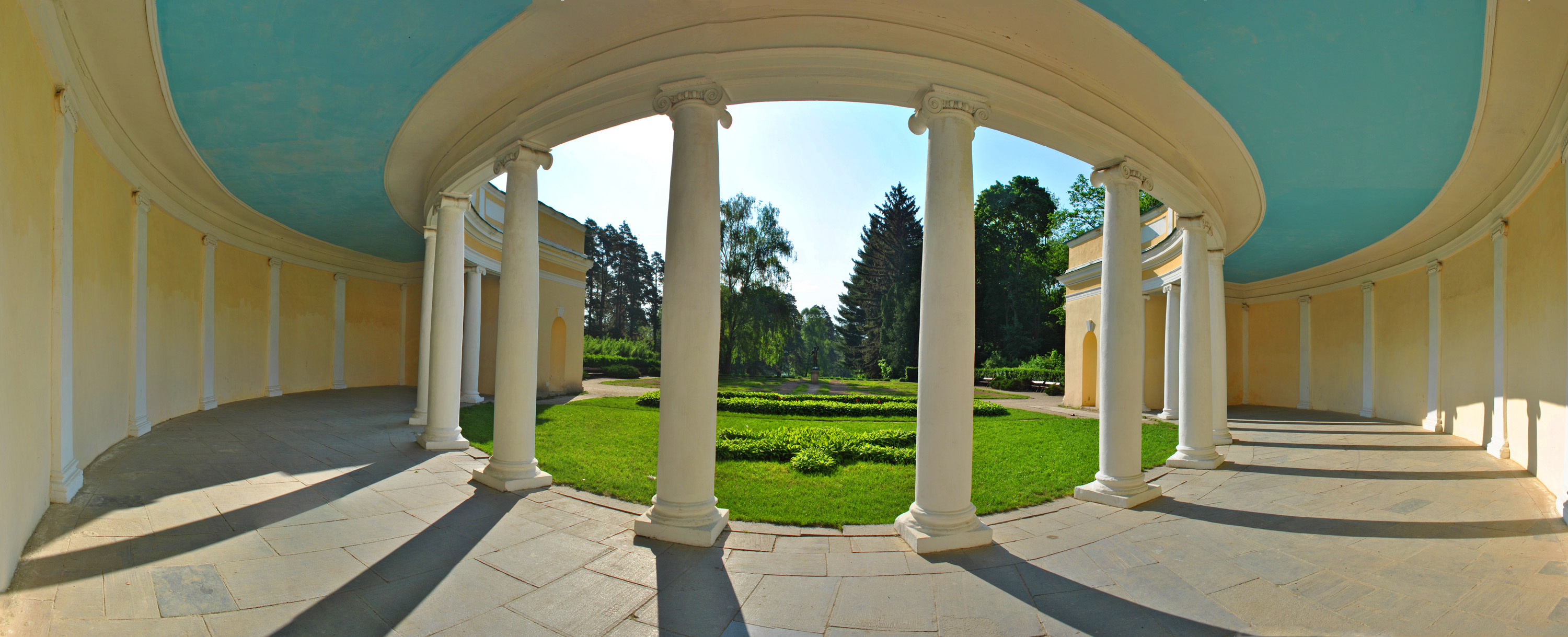 «Олександрія», Білоцерківський район, Білоцерківська міська рада, Фурсівська та Пилипчанська сільські ради